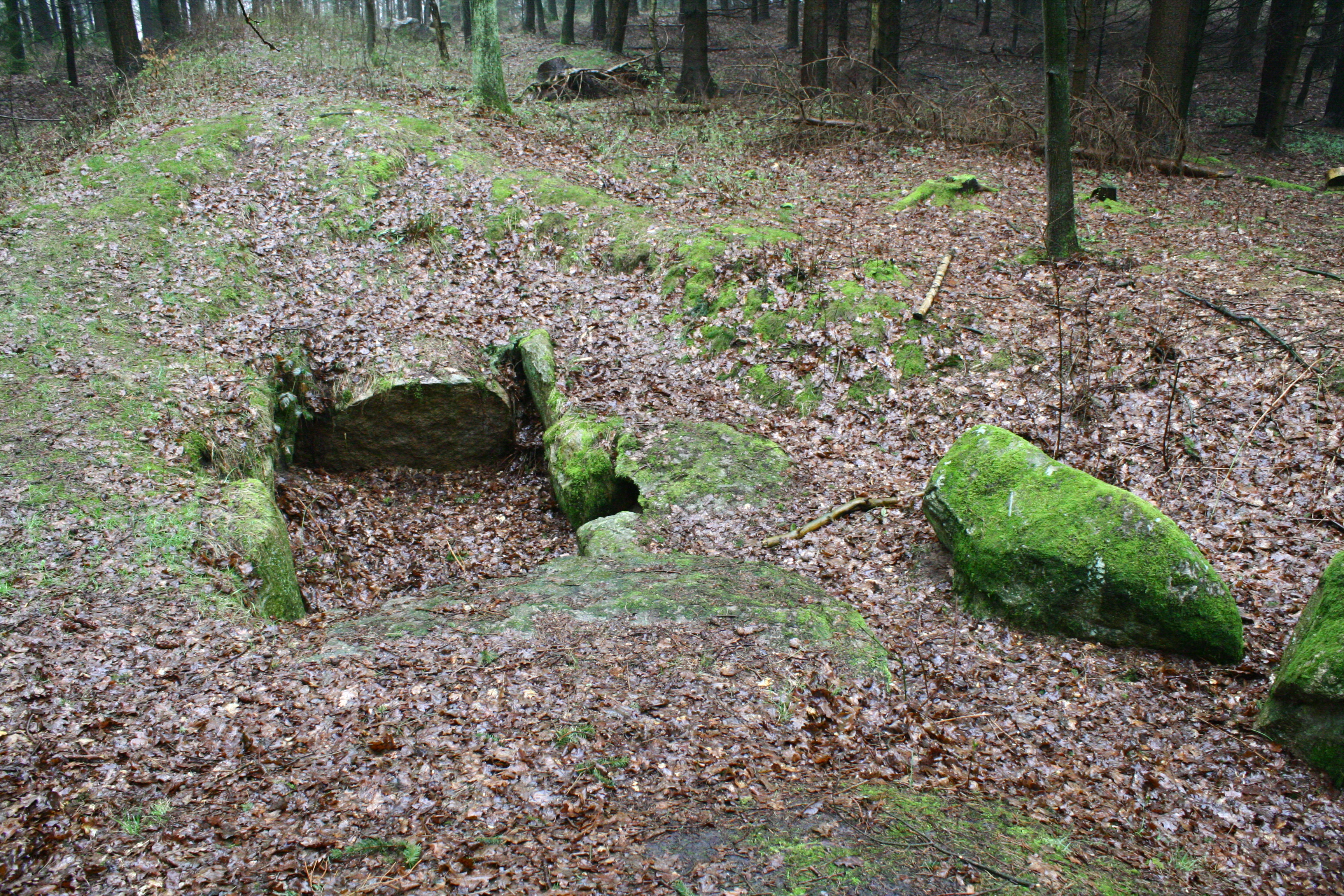 Großsteingrab Horneburg 4